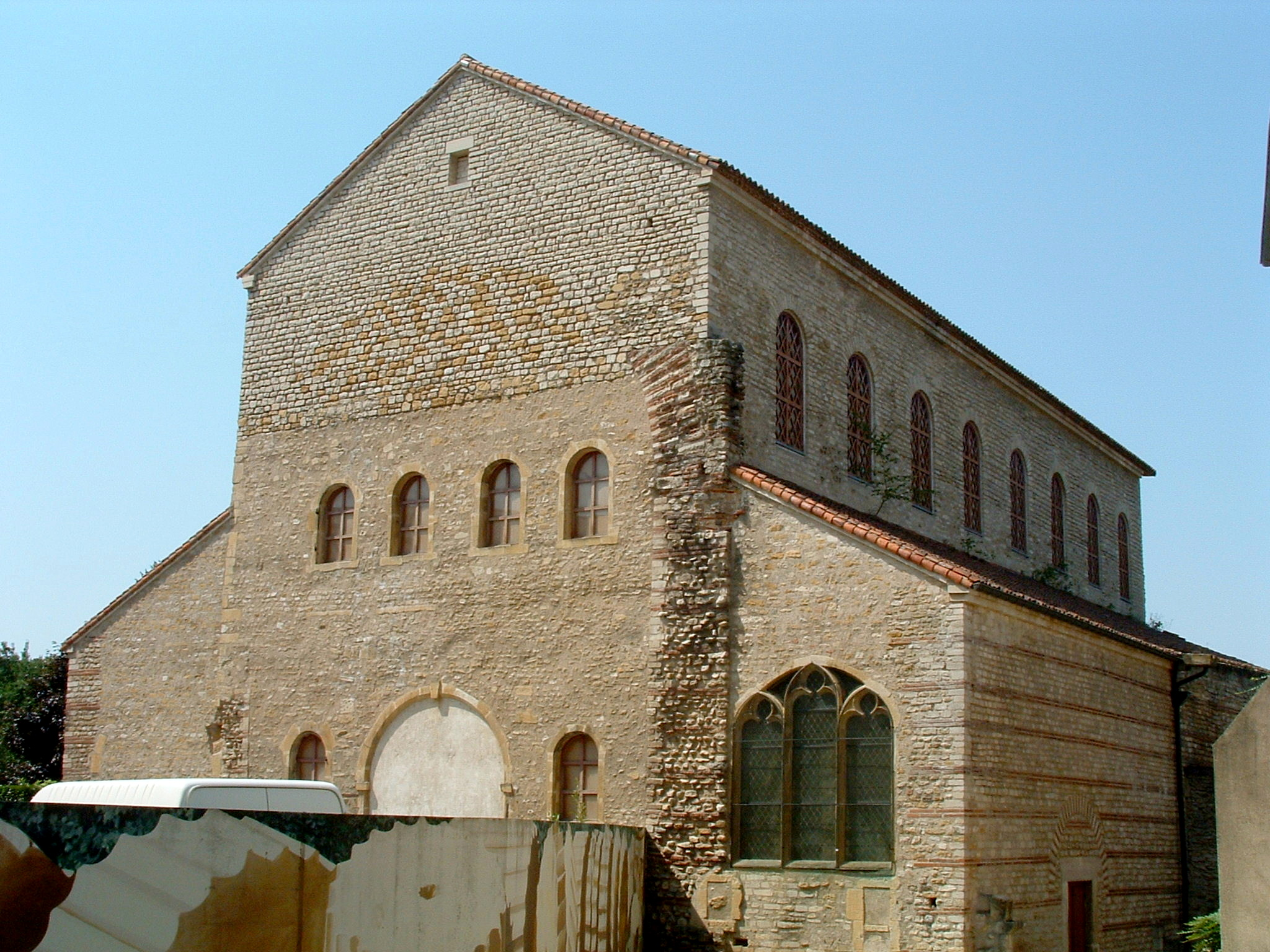 Metz - Église Saint-Pierre-aux-Nonnains - Extérieur - Façade Sud